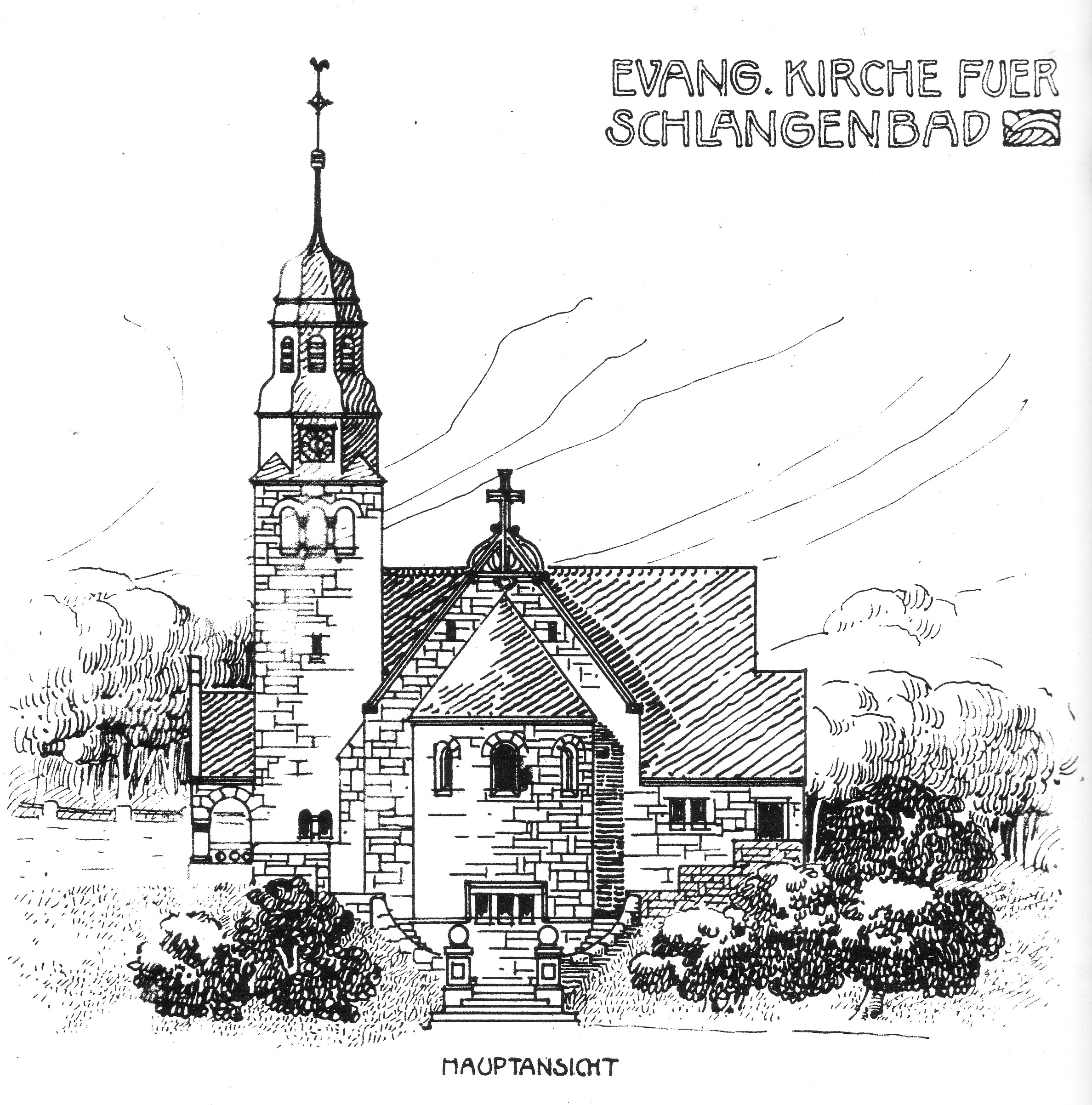 Vorentwurf ev. Christuskirche Schlangenbad